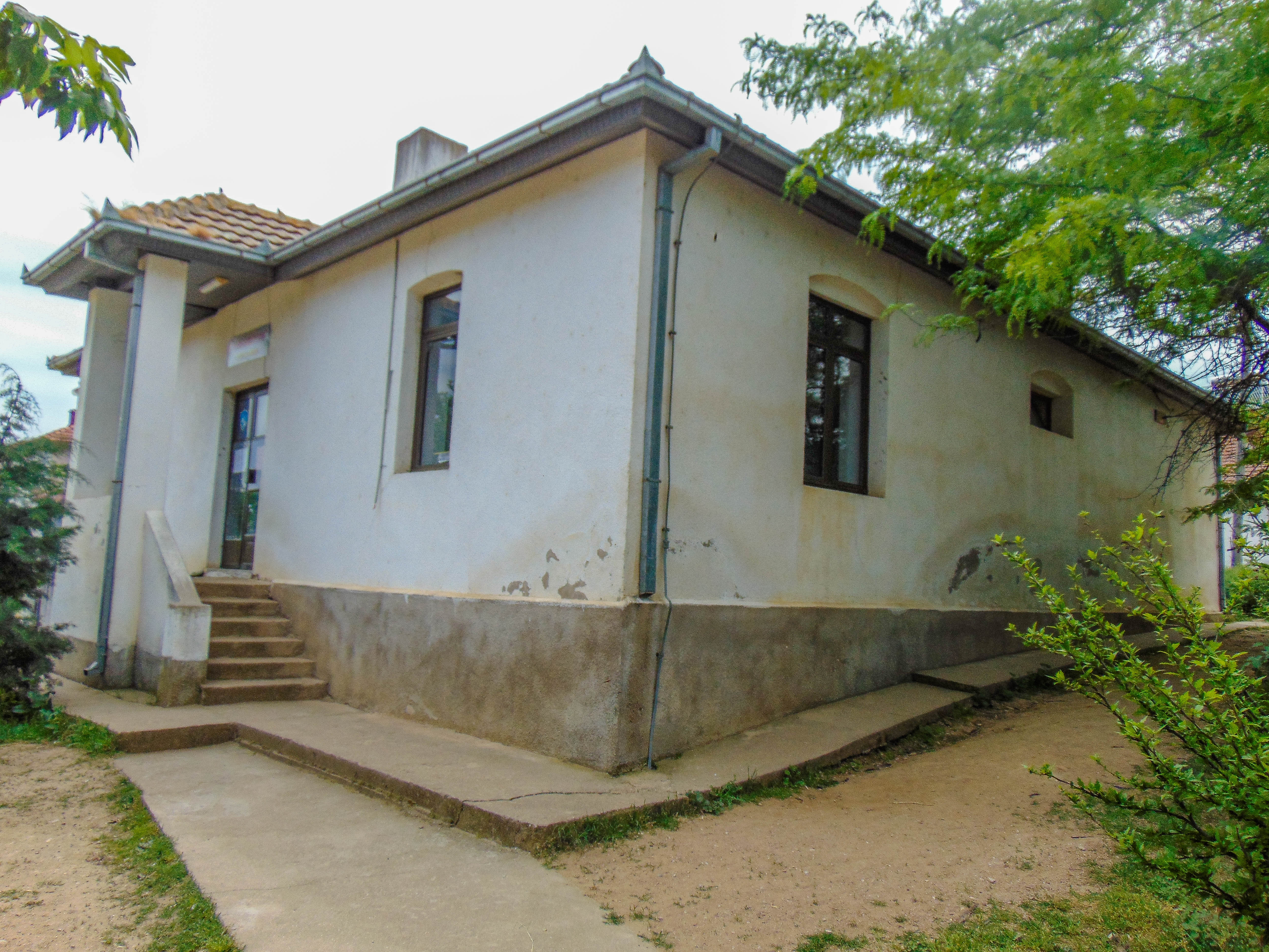 ОУ „Орце Николов“ – Воиславци